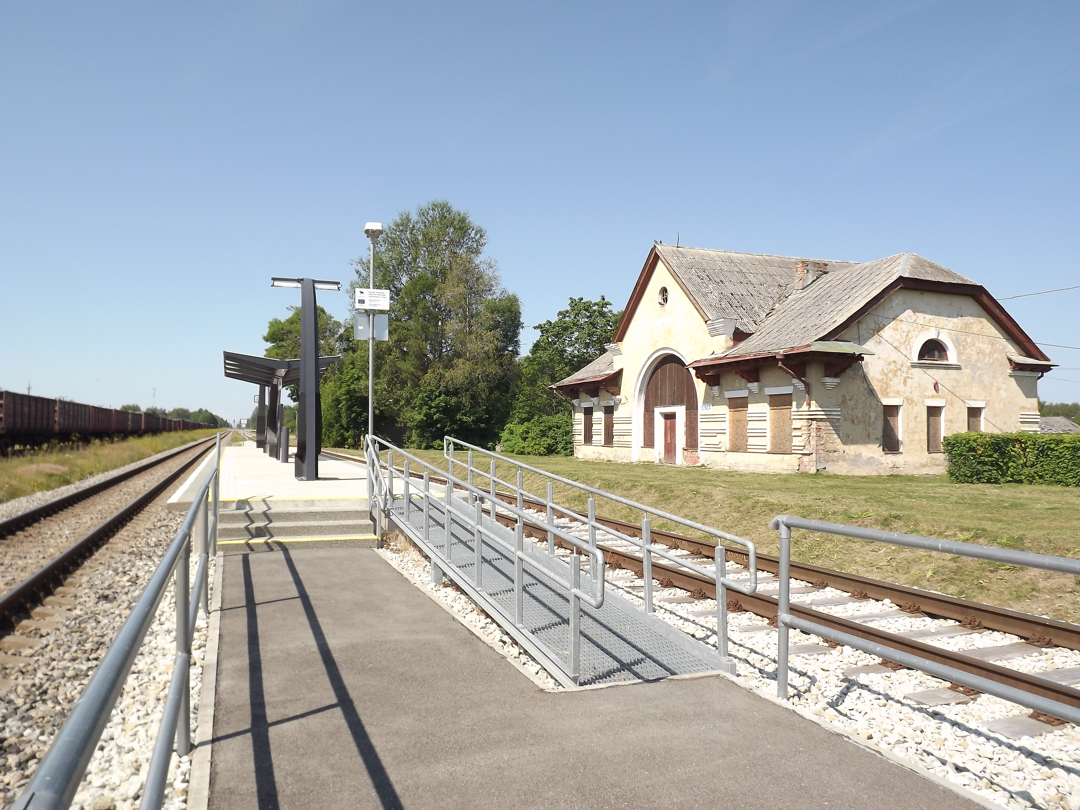 Sonda jaamahoone ja perroon.